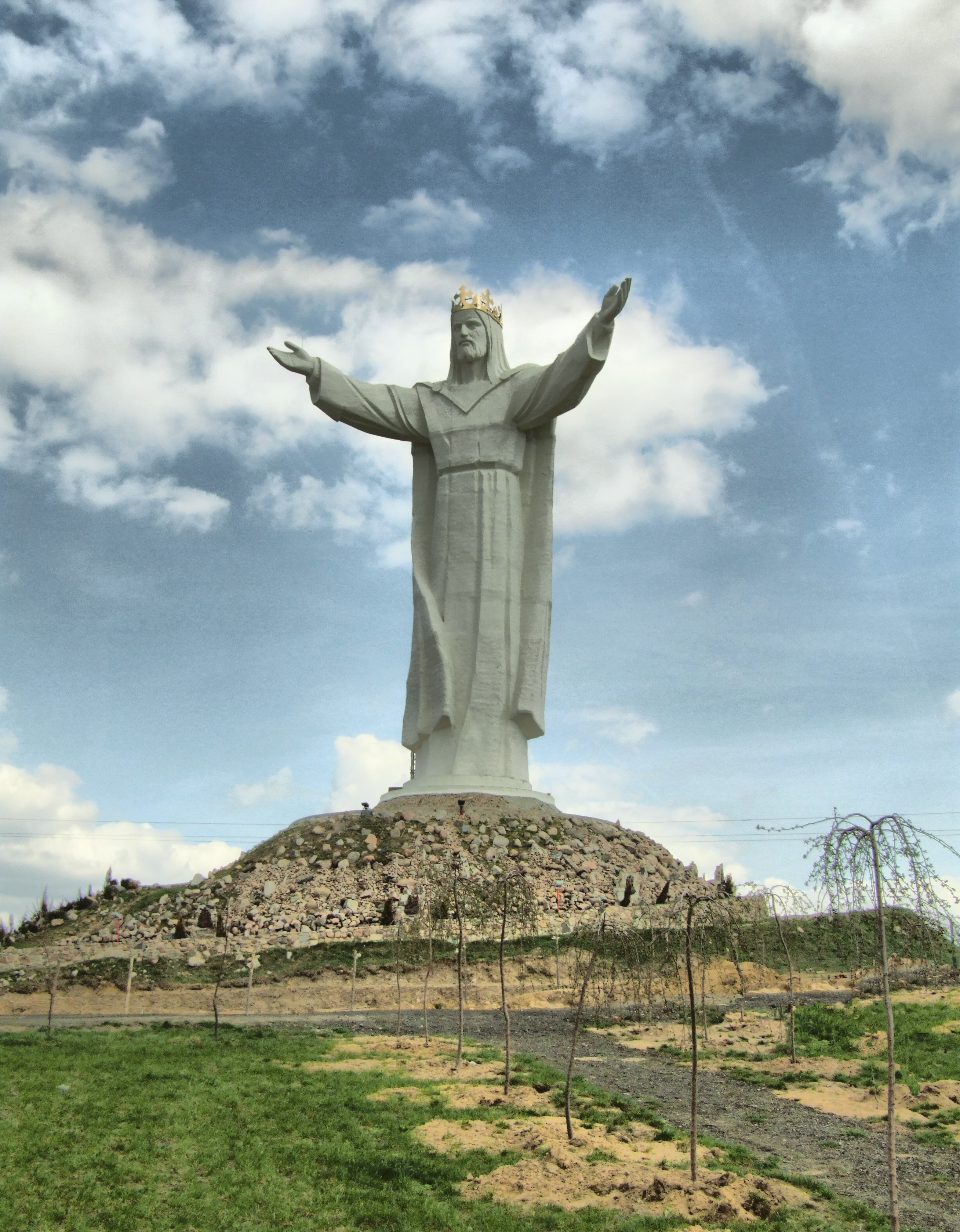 Pomnik Chrystusa Króla w Świebodzinie